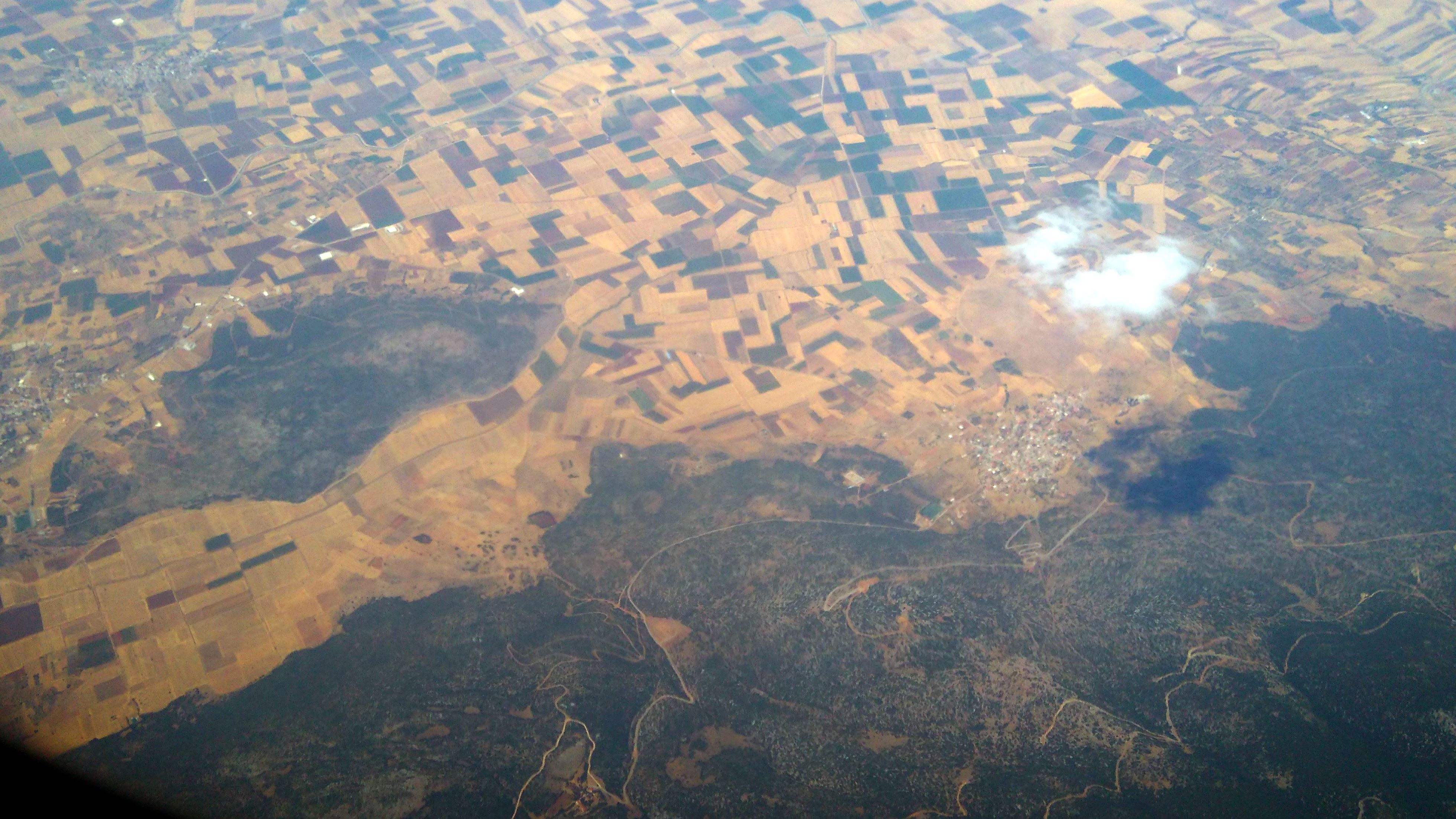 Αεροφωτογραφία Πλαταιών